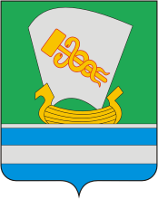 Герб г. Зеленодольск (Татарстан)